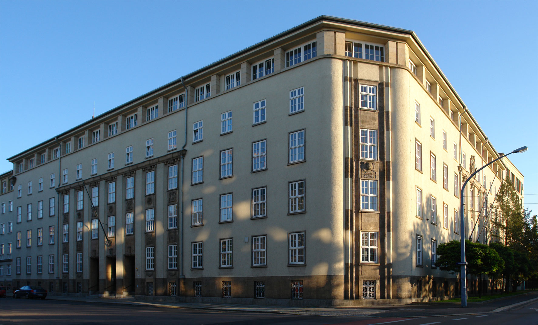 Gebäude der ehemaligen Sozialversicherungsanstalt Sachsen in Dresden-Johannstadt, Dürerstraße / Eliasstraße; erbaut um 1922 nach Entwurf des Dresdener Architekturbüros Schilling und Graebner, später verändert (Dachausbau, neuer Eingang)